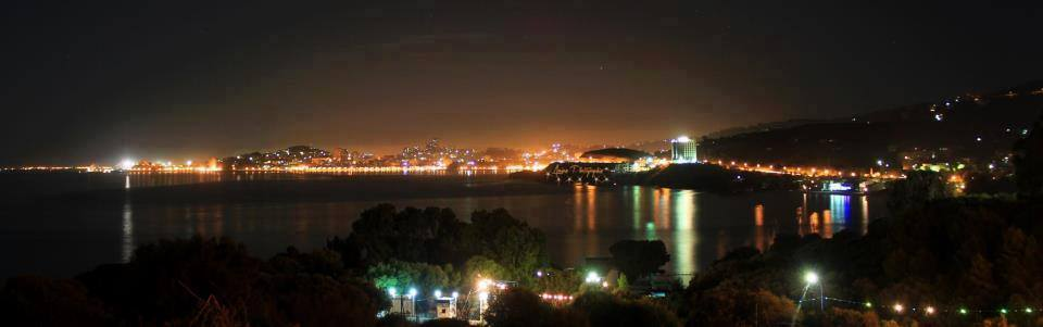 annaba bona algeria